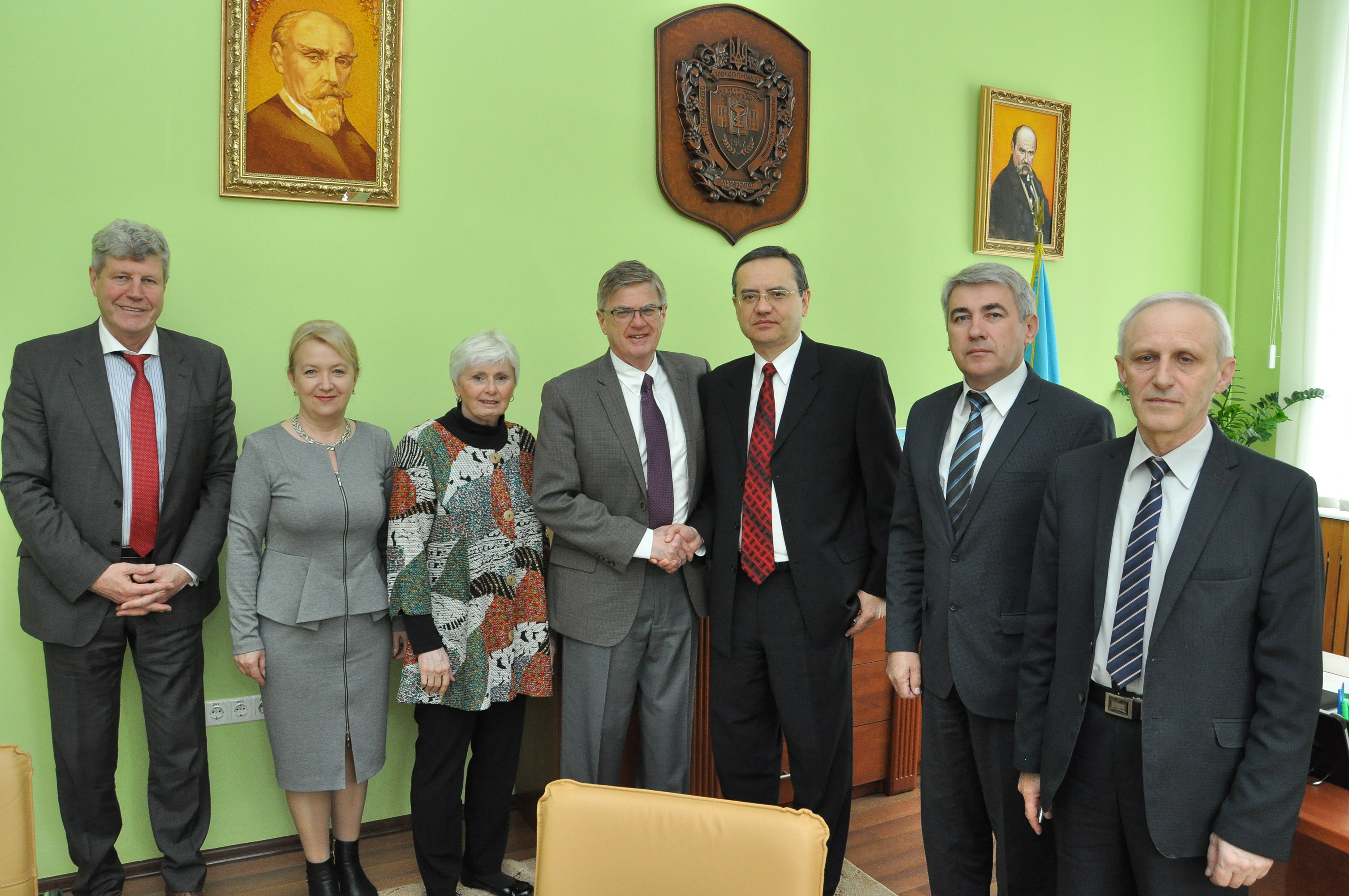 Делегація Університету імені Гранта МакЮена з візитом у Тернопільському державному медичному університеті імені І. Я. Горбачевського. Зліва направо: проектний менеджер Центру українських ресурсів та розвитку Університету імені Гранта МакЮена Юрій Конкін, керівник відділу міжнародних зв'язків ТДМУ Наталія Лісничук, президент Університету імені Гранта МакЮена, доктор Девід Аткінсон із дружиною (зліва), ректор ТДМУ Михайло Корда, проректор з науково-педагогічної роботи ТДМУ Аркадій Шульгай і проректор з науково-педагогічної та лікувальної роботи ТДМУ Іван Кліщ.